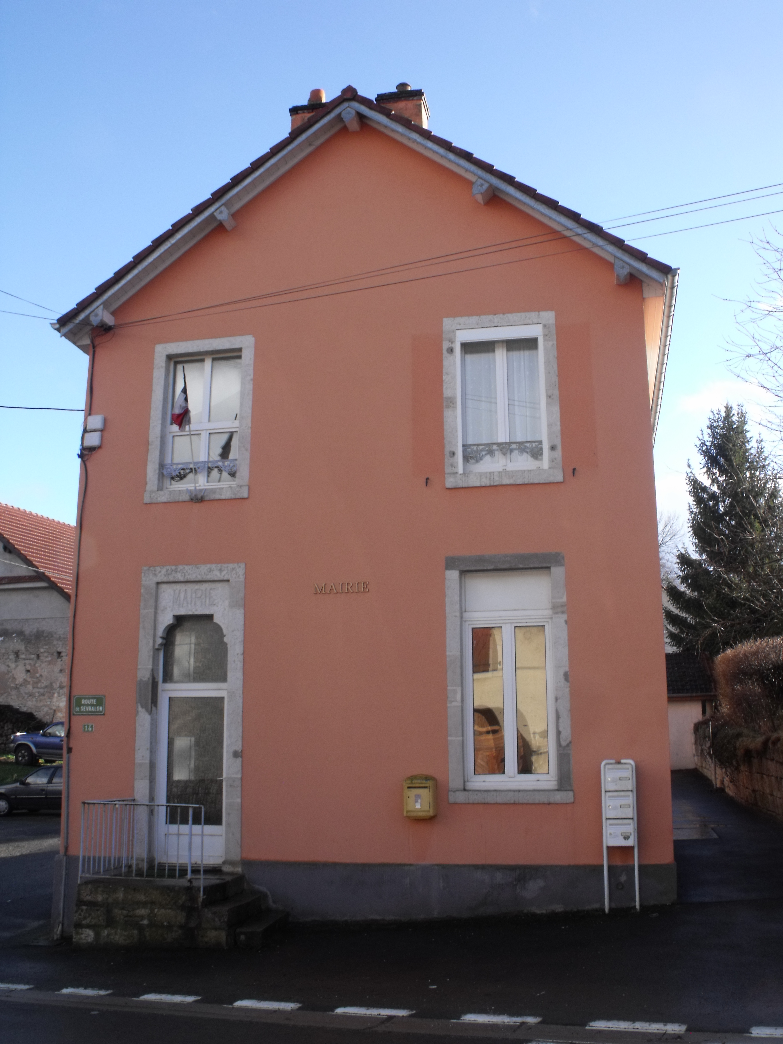 Mairie de Thulay, Doubs, France